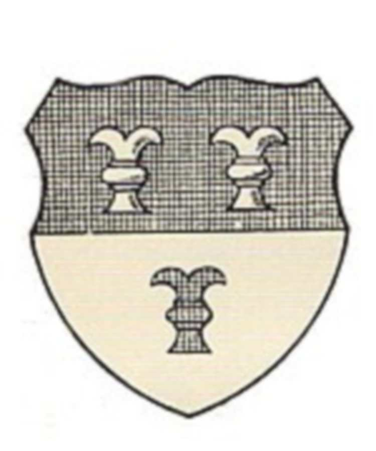 Familienwappen Carl von Hohenbalken (bischöfliches Ministerialengeschlecht des Münstertales)Blasonierung: Geteilt von Schwarz und Silber mit drei Schachfiguren (2, 1) in gewechselten Farben.